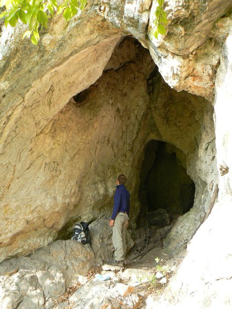 Úkryt žien. Táto 16 m dlhá korózna jaskyňa v Hrhovskom amfiteátri chránila obyvateľov Hrhova nielen v čase tatárskych vpádov, ale aj počas II. svetovej vojny.